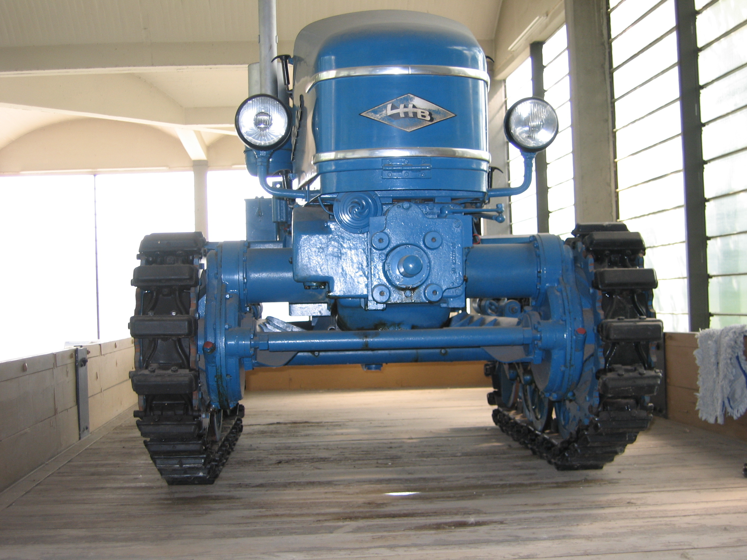 LHB Robot Raupenschlepper mit 25 PS; nur eine geringe Stückzahl wurde hergestellt